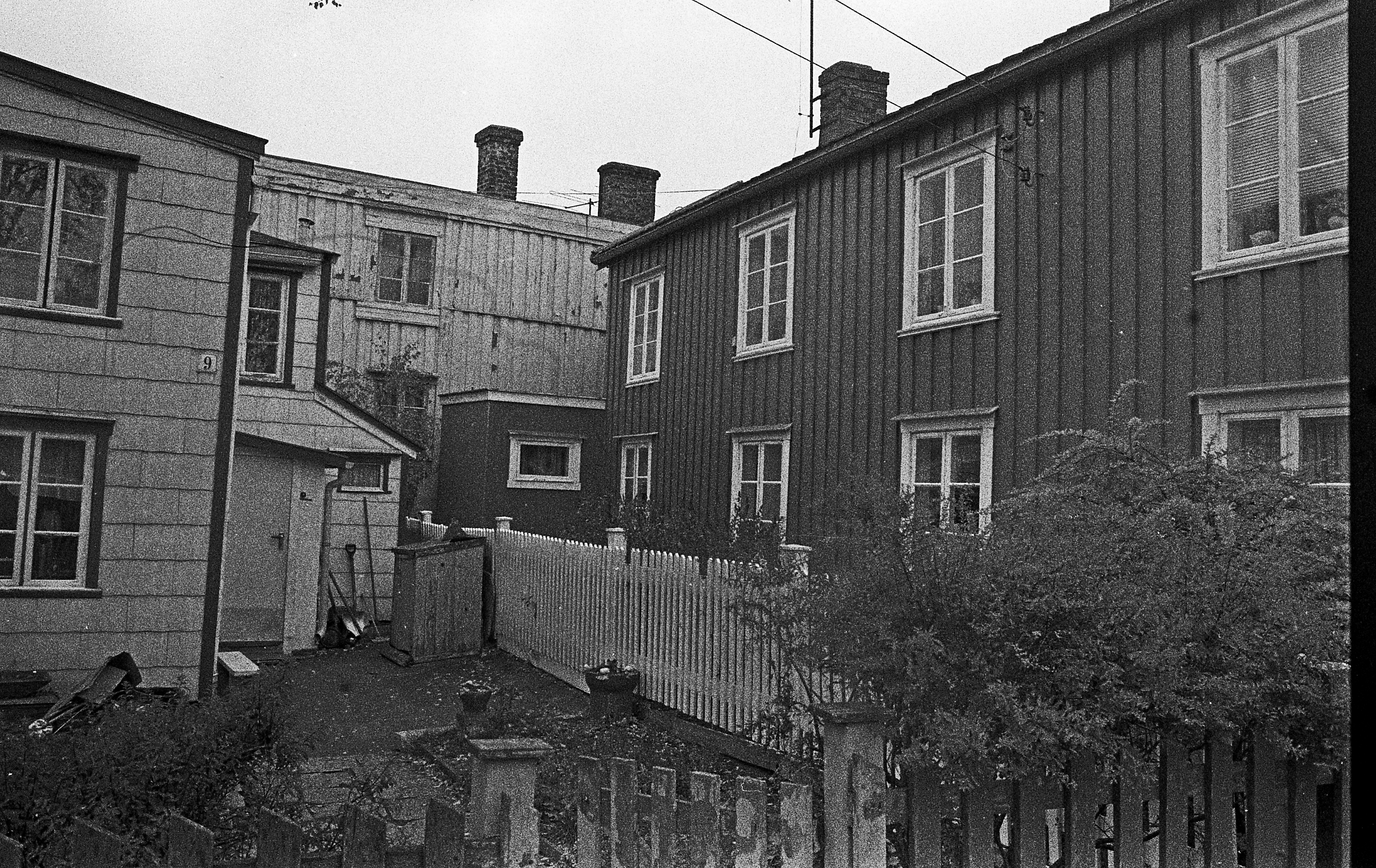 Format: sort/hvitt negativ Film: Kodak tri pan Safetyfilm Dato / Date: Oktober 1978 Fotograf / Photographer: Kjell Andresen Sted / Place: Brodals gate 9 og 11, Trondheim Wikipedia: Svartlamon WikiStrinda: Strandveien Google Maps: bit.ly/10aMbQ5 Flyfoto 1937: bit.ly/143kqZJ Eier / Owner Institution: Trondheim byarkiv, The Municipal Archives of Trondheim Arkivreferanse / Archive reference: Tor.H43.P3.F10752, film 181 Merknad: Fra Byantikvarens negativsamling. Brodals gate er en blindvei fra Strandveien sørøstover mot jernbanelinja. Gaten ble oppkalt etter familien Brodal, som eide grunnen i området. Brodals minne gnr 9/78, tidligere eiendom på Lademoen. Utskilt fra Valhalla i 1873 og solgt til Arnt A. Brodal. Ble senere overtatt av bakermester Christian Brodal og deretter kjøpmann Albert Brodal. I begynnelsen av 1900-tallet ble husene revet for å gi plass til Meråkerbanen. Valhalla var ett tidligere landsted på Lademoen der hvor Brodals gate 2-8 ligger i dag. (Kilde: Trondheim byleksikon, 2008)